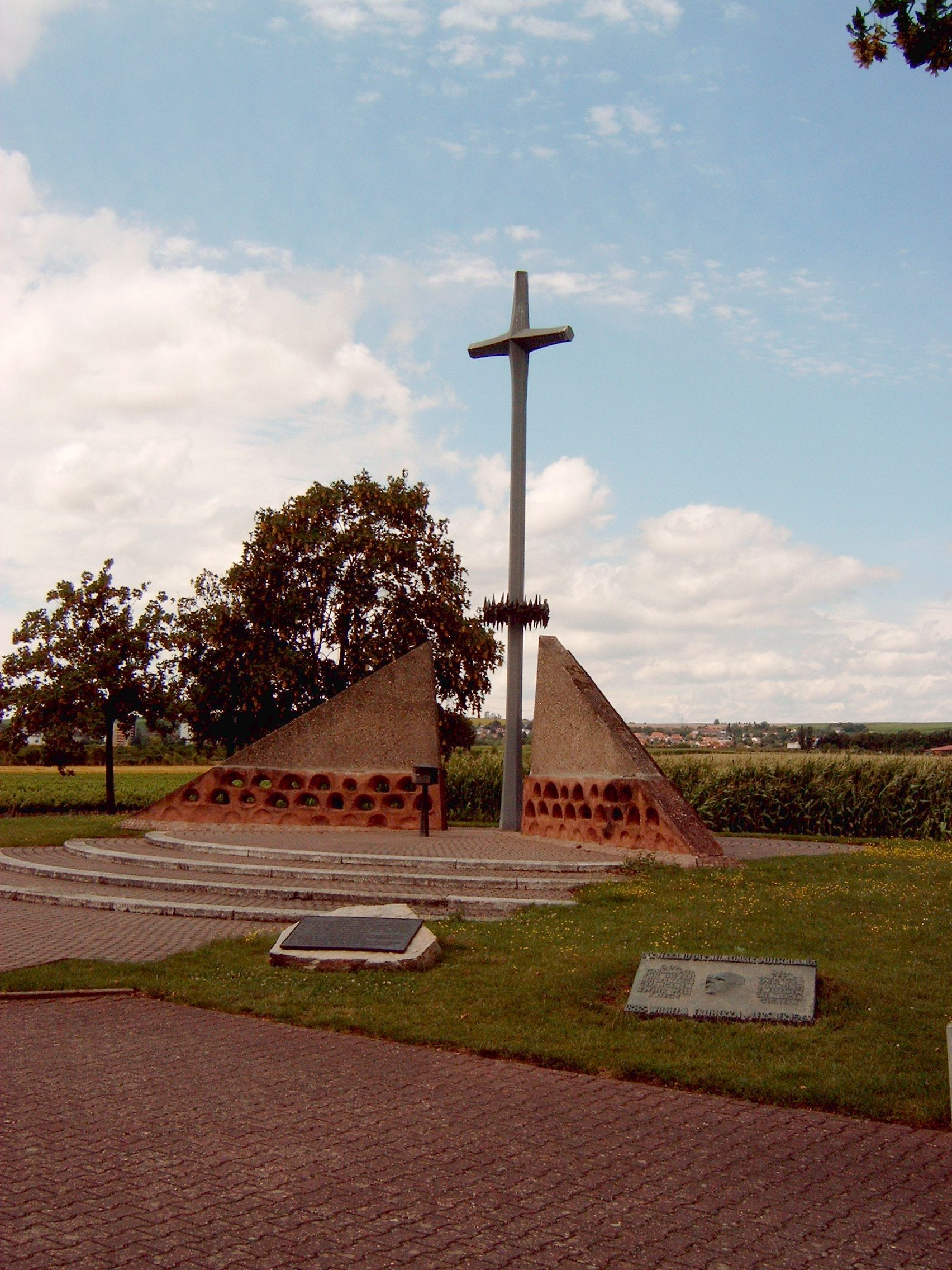 Mahnmal Feld des Jammers bei Bretzenheim. Im Bildhintergrund die Ortschaft Winzenheim